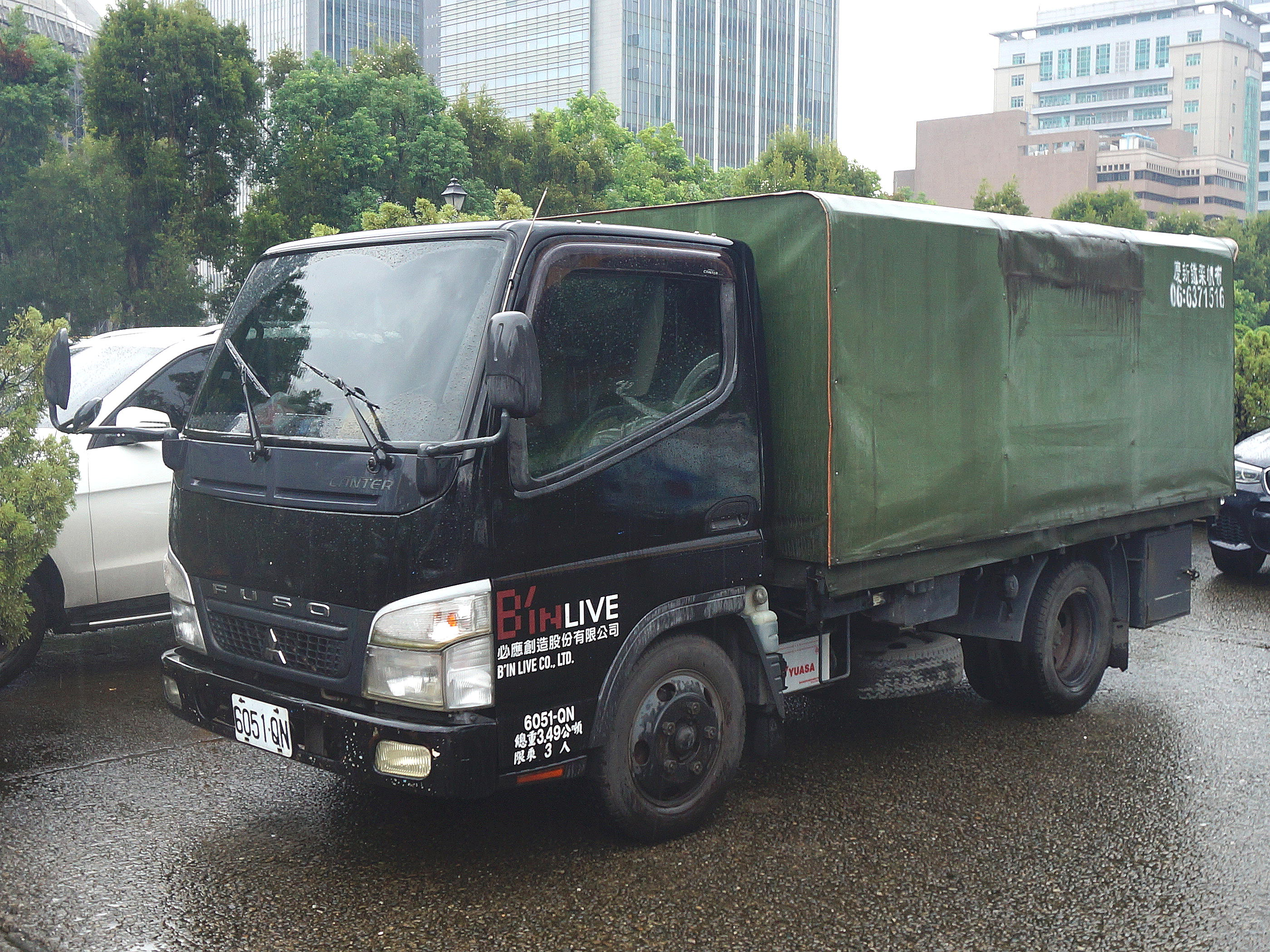 2019年（中華民國108年）第54屆金鐘獎廣播金鐘獎頒獎典禮，雨中的必應創造三菱堅達貨車6051-QN。